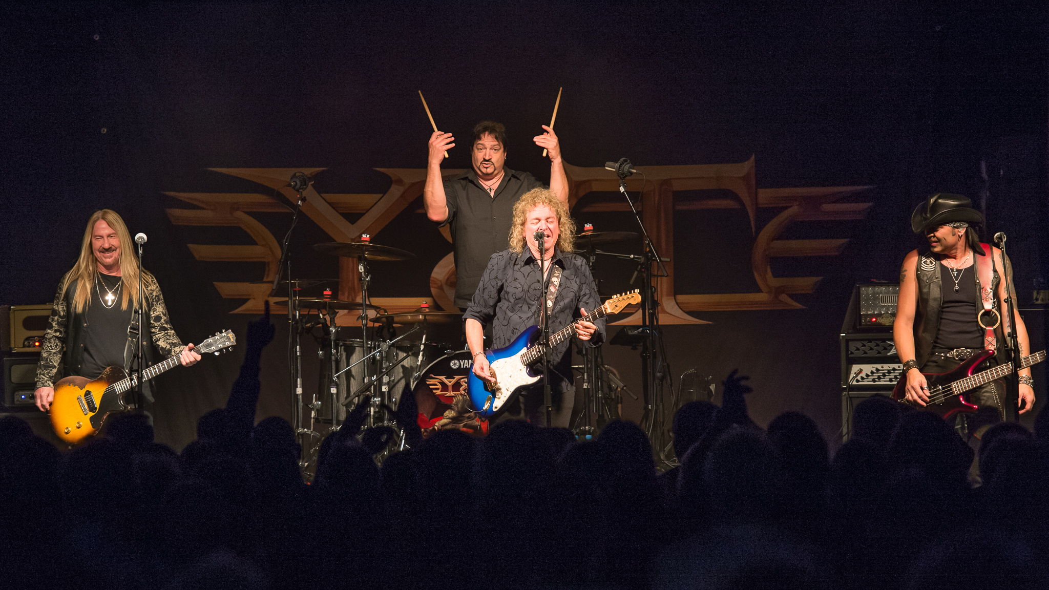 Aaron Leigh,Concertbüro Franken,Dave Meniketti,Der Hirsch,John Nyman,Konzert,Livekonzert,Livemusik,Mike Vanderhule,Musik,Y&T